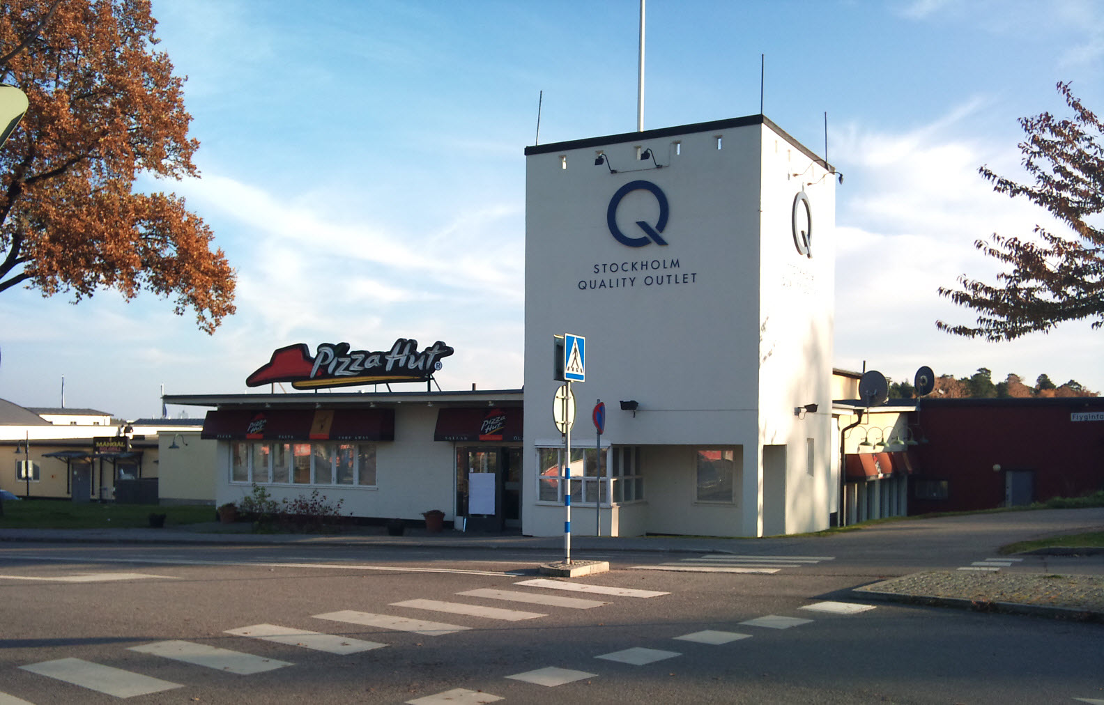 Före detta vaktkasernen vid F 8 Barkarby, sedan 1990-talet en del av Stockholm Quality Outlet i Järfälla kommun.